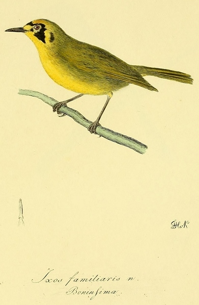 Illustration from Über einige Vögel von Chili : beobachtet im März und anfang April 1827. By F.H. von Kittlitz. Published in St. Petersburg :Académie impériale des sciences,1830-1835.